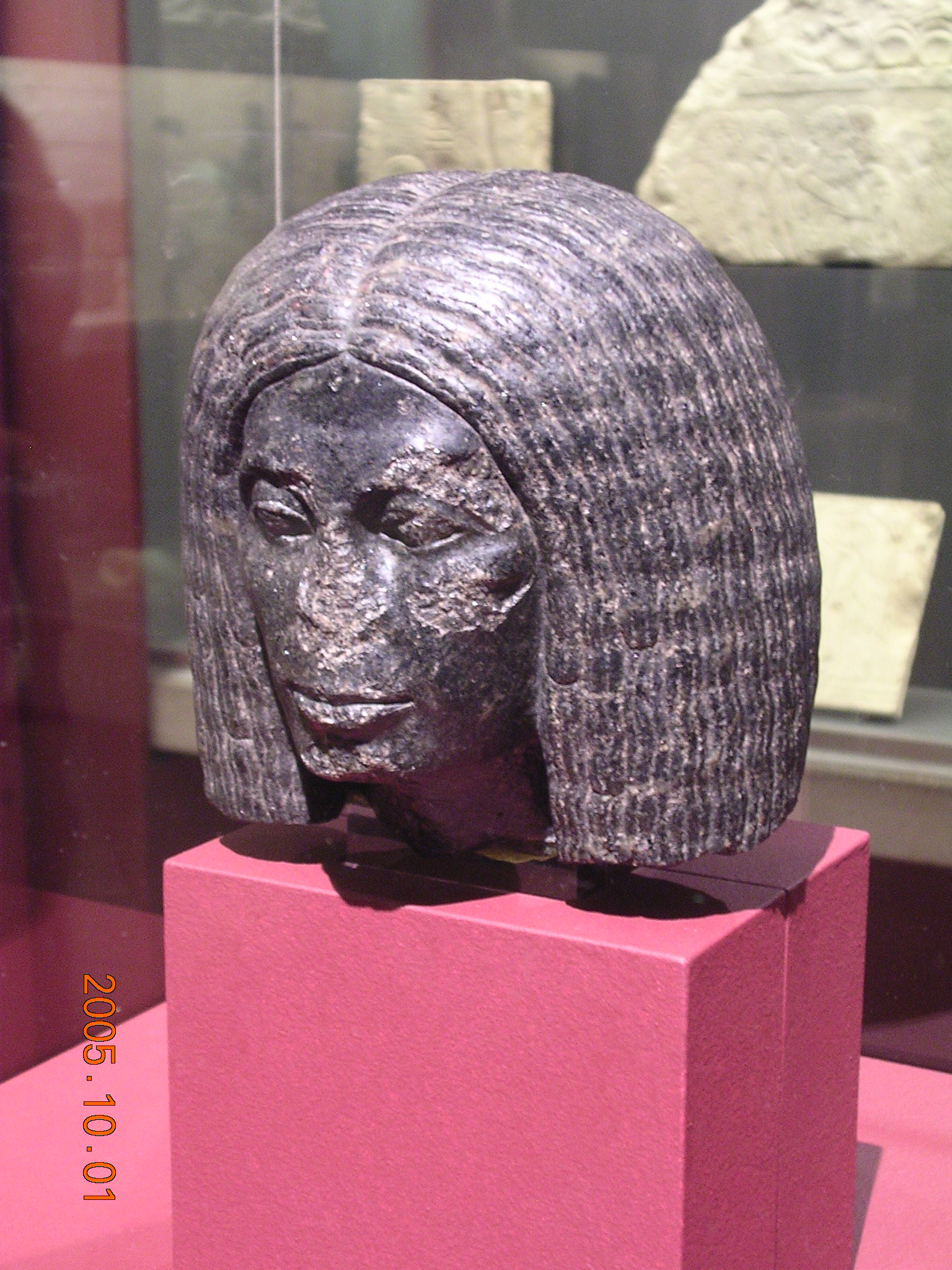 Ay, a szürke eminenciás (Námetország, müncheni régészeti múzeum)